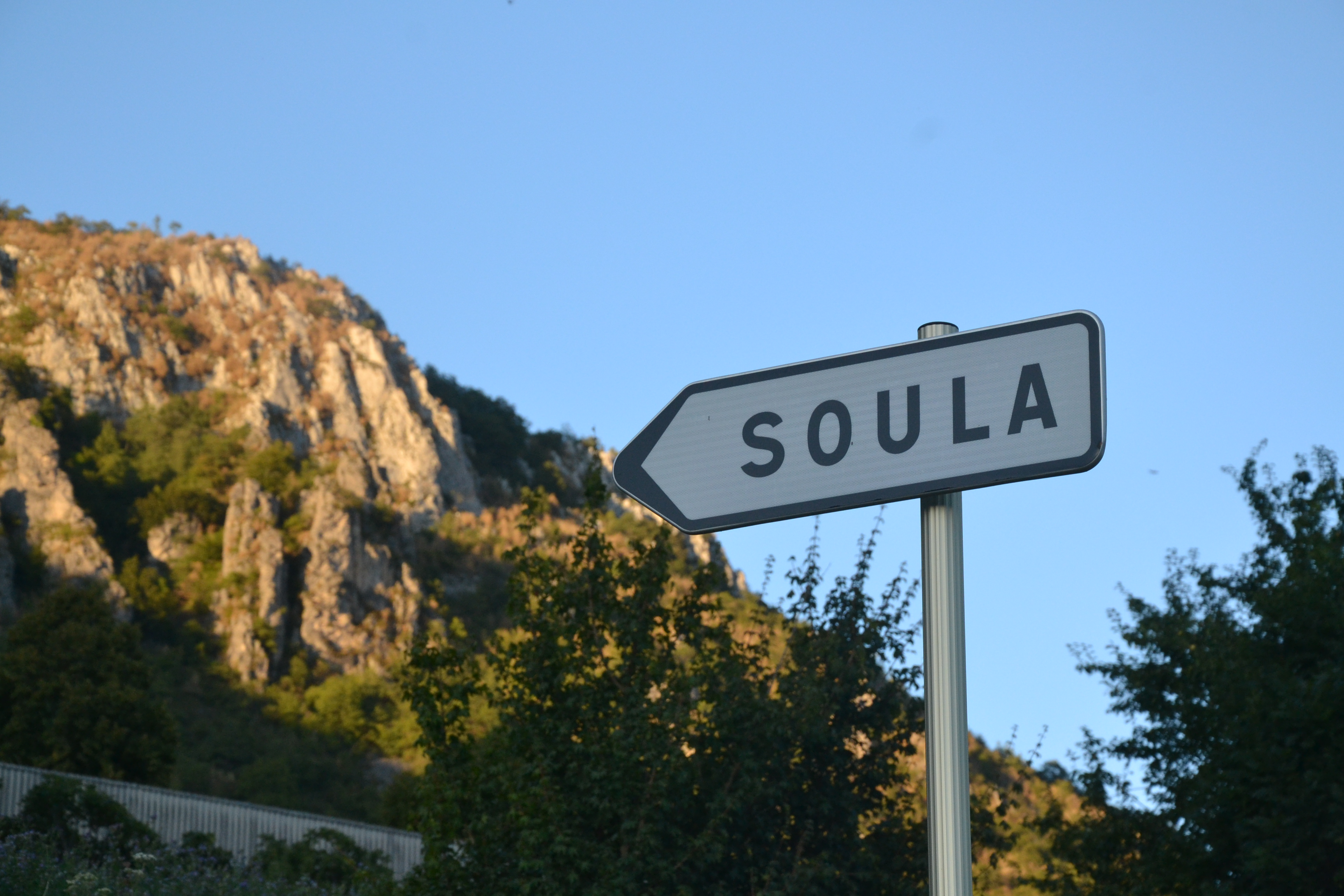 Soula (Ariège, France). Le toponyme évoque le versant sud d'une montagne en région languedocienne. Ici, le versant sud du Plantaurel exposé au soleil couchant.